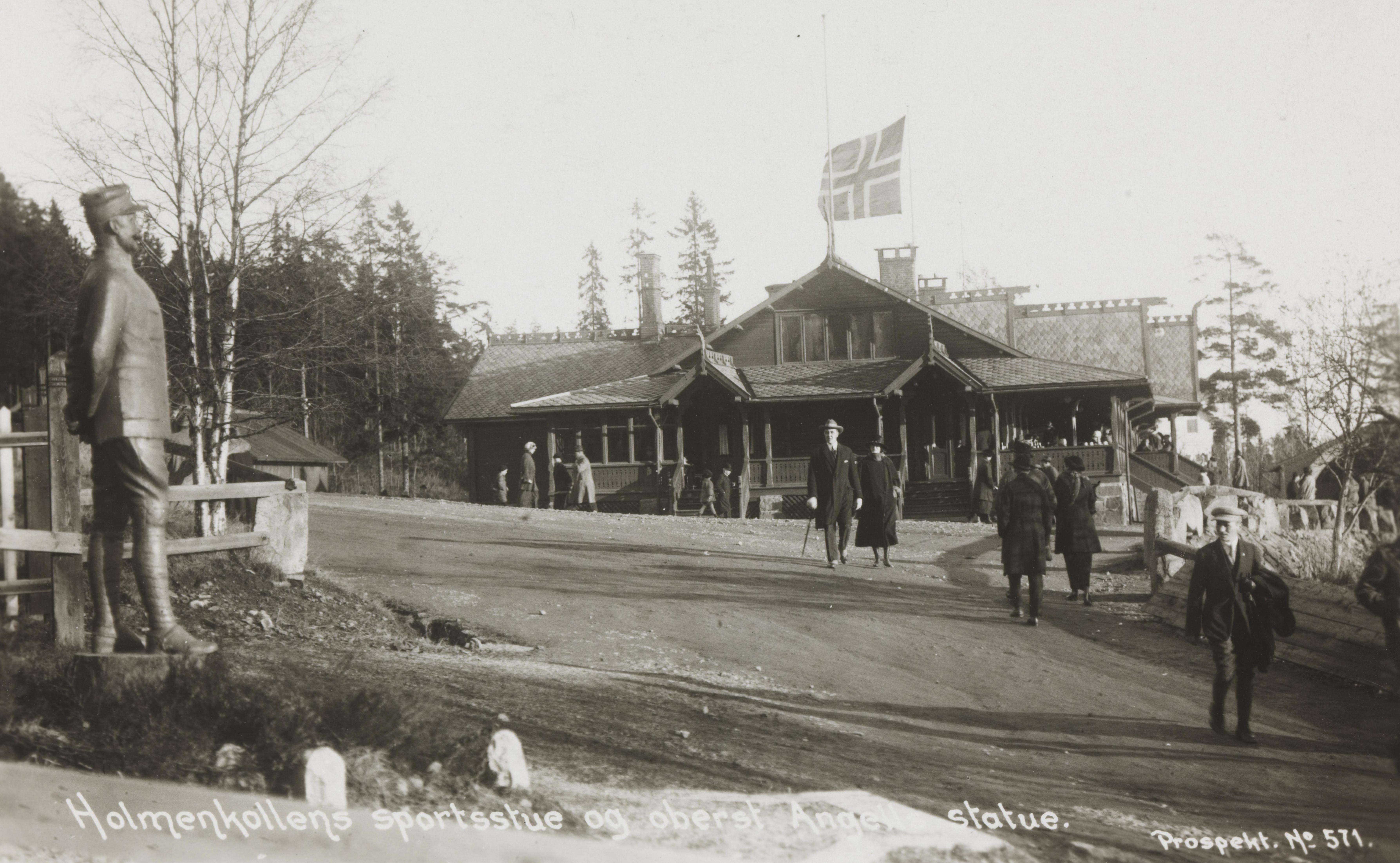 Bildet er hentet fra Nasjonalbibliotekets bildesamling Holmenkollen resturant,Holmenkollen sportstue, Oslo, Oslo